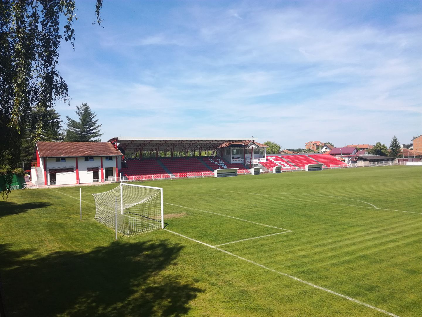 Neu Renoviertes Stadion, im Sommer 2017.